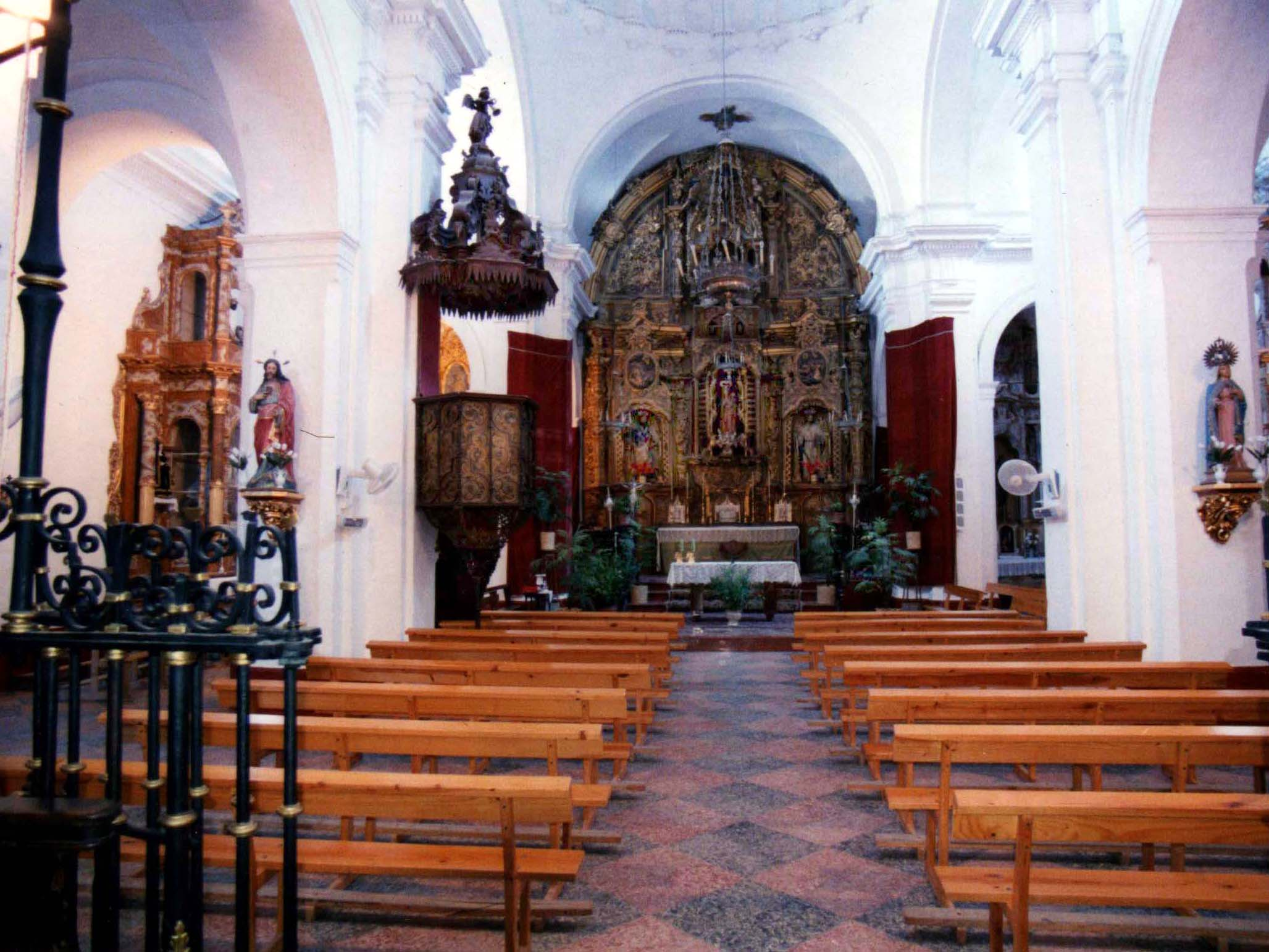 Interior de la Iglesia Santa María de la Meza en Zahara de la Sierra